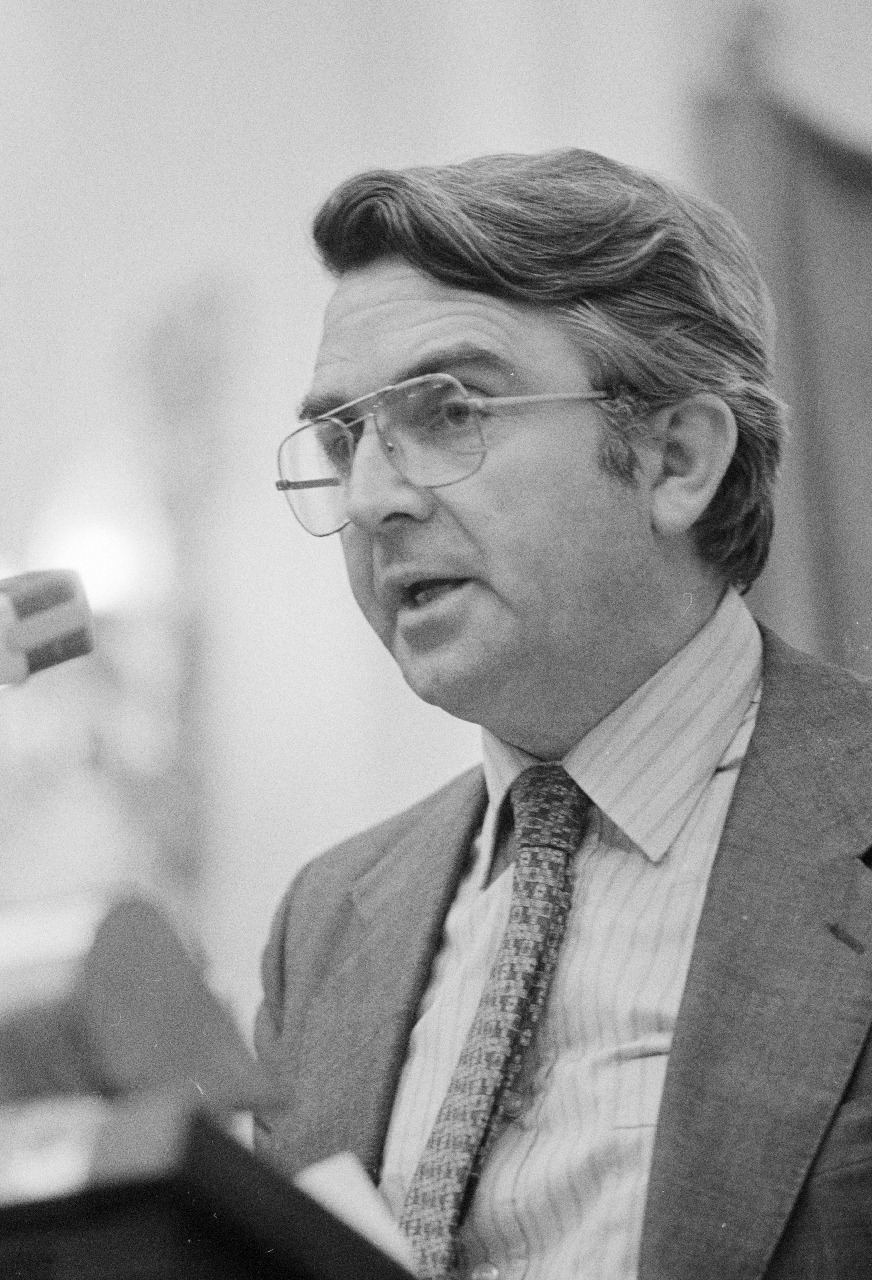 Tweede Kamer debat over olieboycot Zuid Afrika: J.N. Scholten